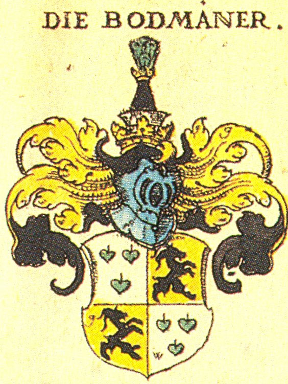 Ritterschaft und Adel in Schwaben Die Bodman